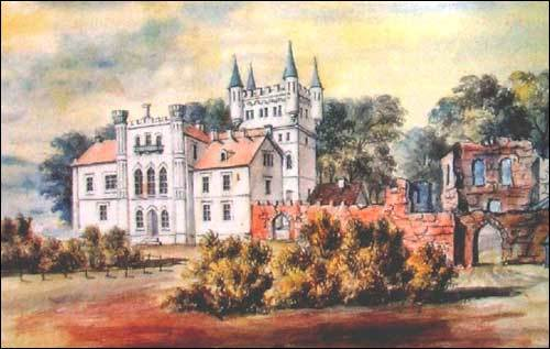 с.Білокриниця (Кременецький район). Палац Чосновських з руїнами замку Збаразьких.